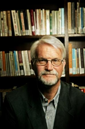 Portrett av Jon Birger Østby, tatt for bruk i informasjonsarbeid og pressedekning for ABM-utvikling